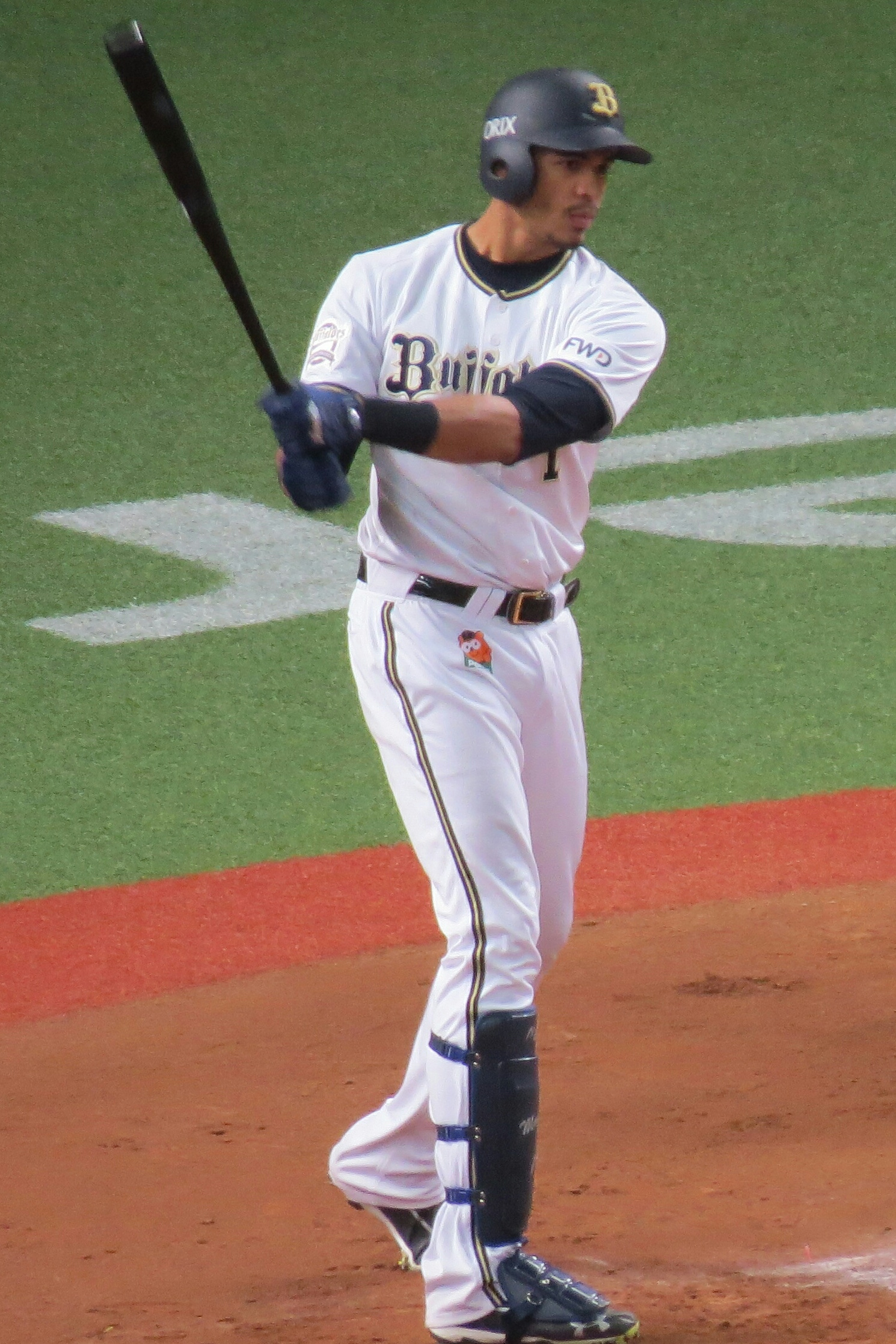 スティーブン・モヤ 20190920